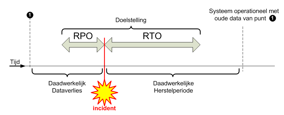 Grafische voorstelling van RPO en RTO in geval van een incident.